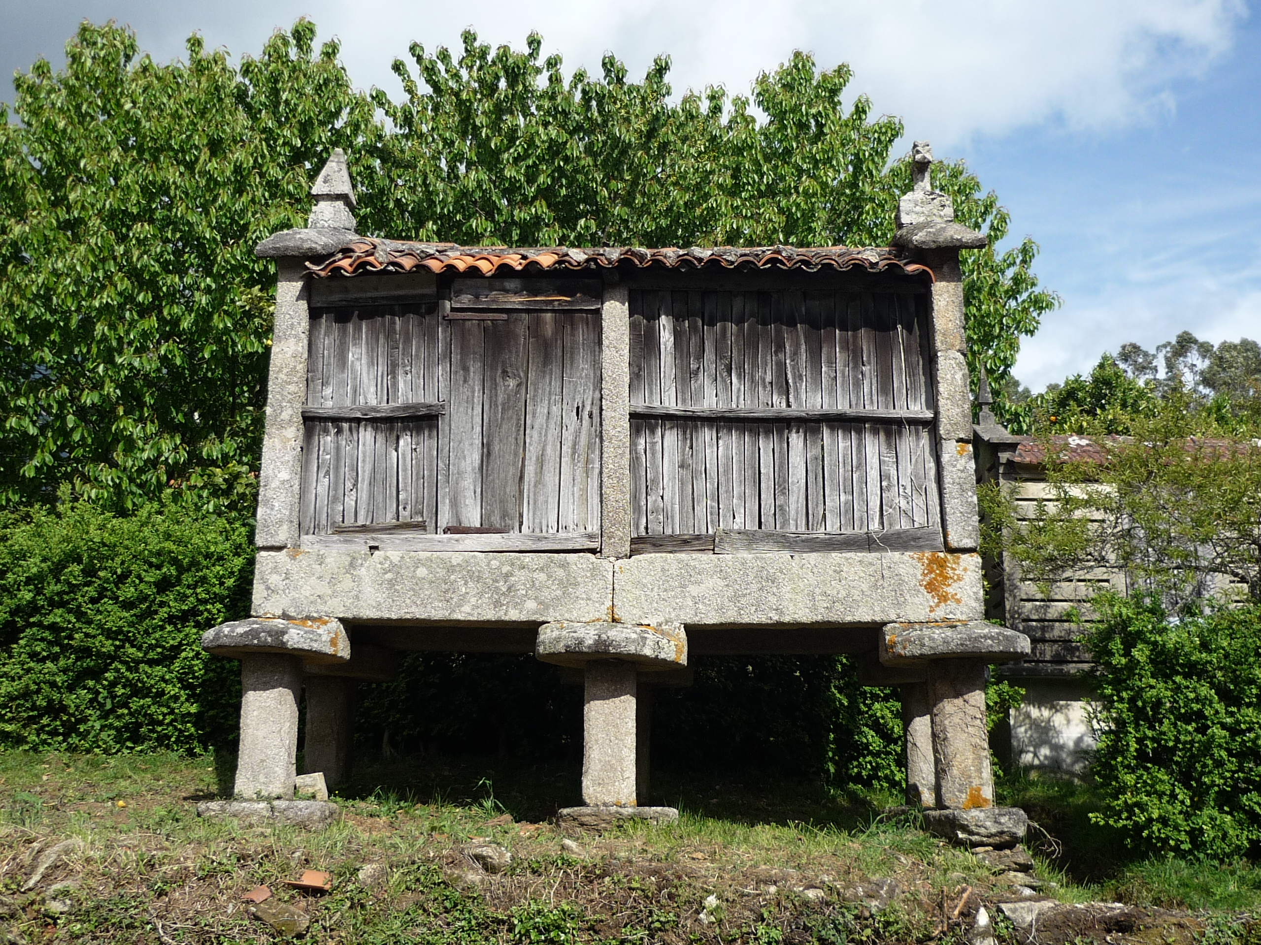 horreos Noia S Francisco